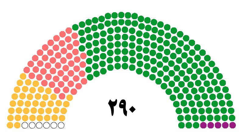 کرسی های مجلس ششم شورای اسلامی بر اساس گرایش سیاسی نمایندگان